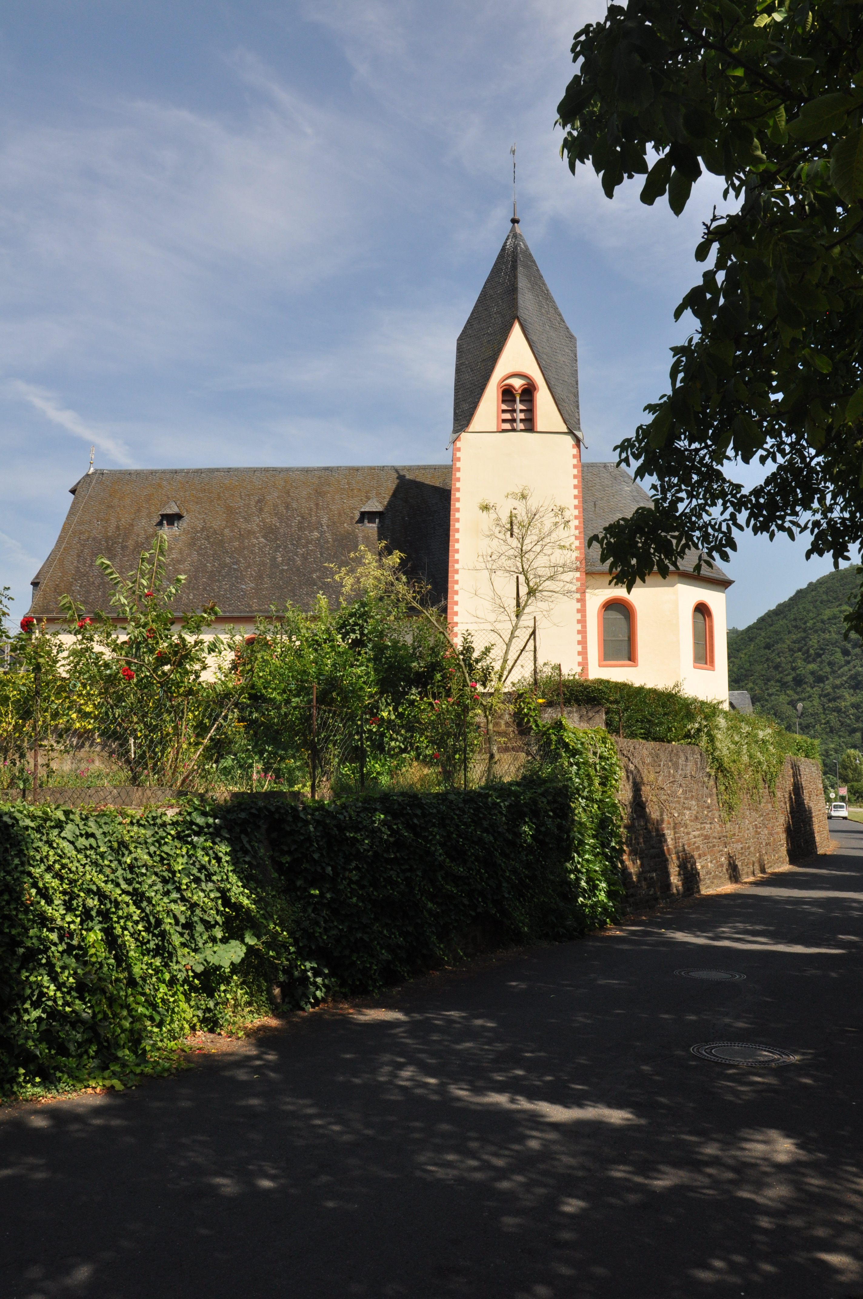 Müden (Mosel), St. Stephanus